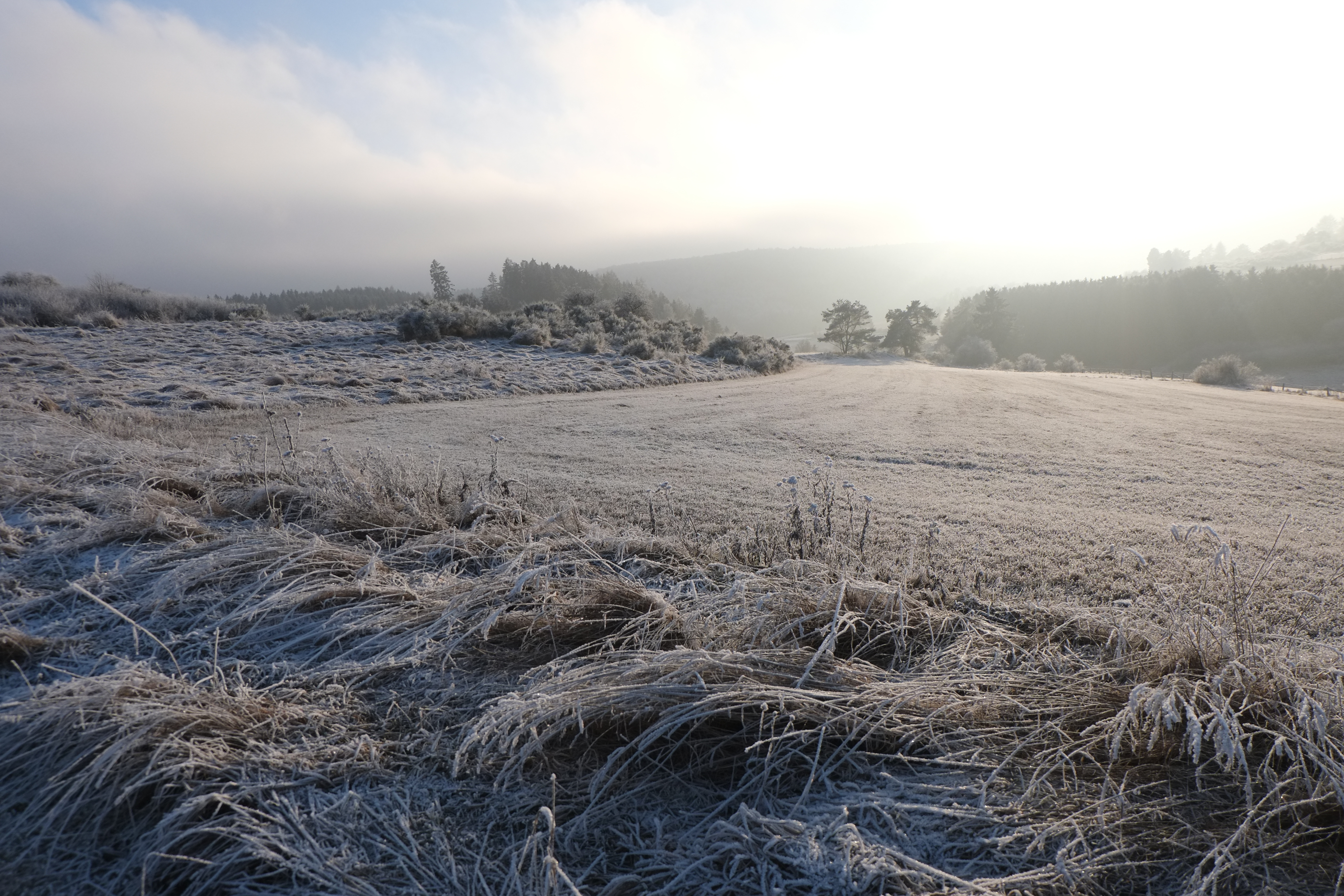 Lichtenberg bei Bromskirchen (Hessen, Deutschland) im Winter